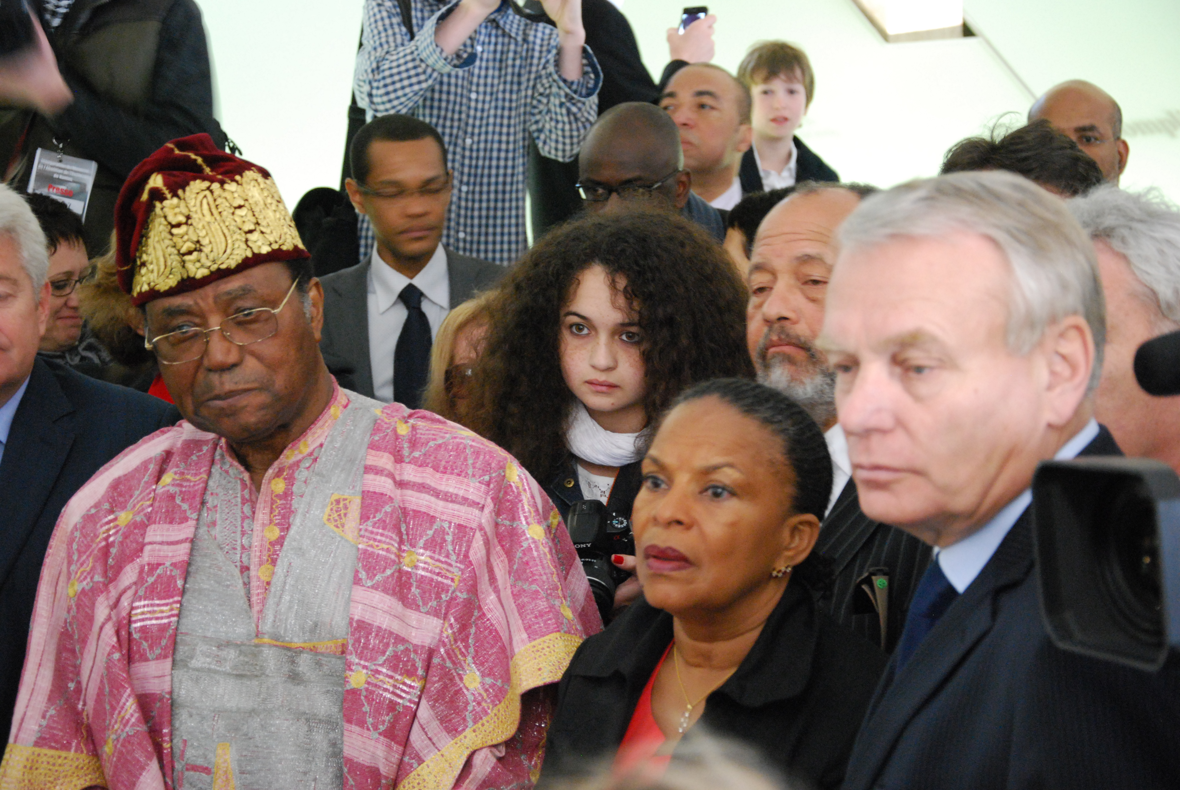 Inauguration du Mémorial de l'abolition de l'esclavage de Nantes, le 25 mars 2012.